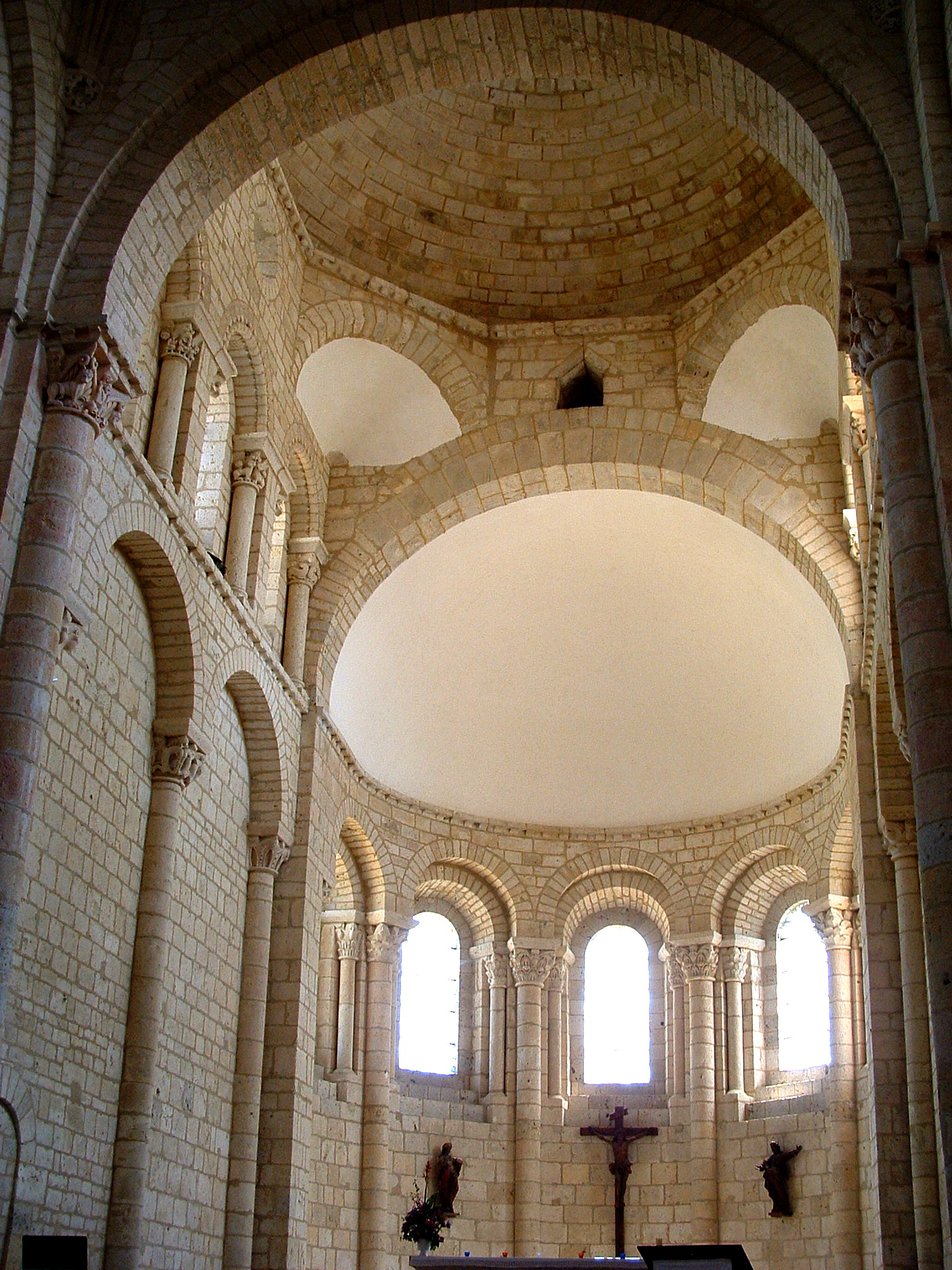 Moirax - Église Notre-Dame - Choeur